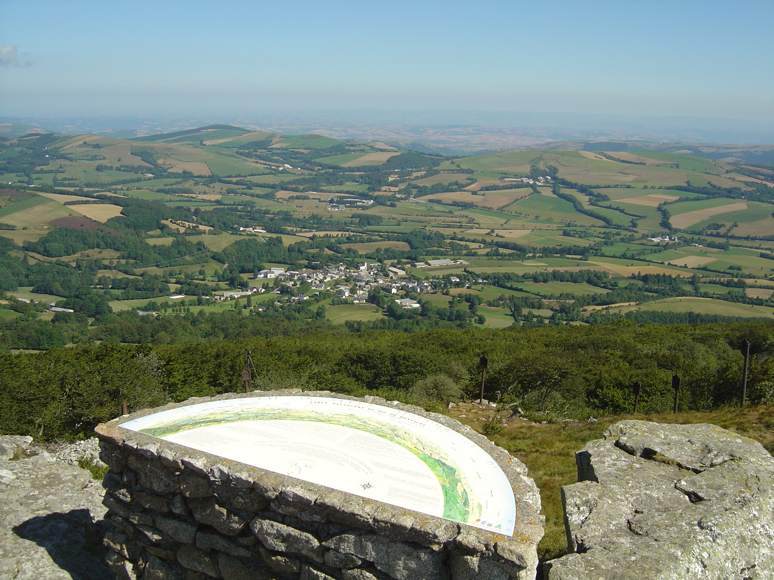 Table d'orientation du roc de Montalet (1259m) - Lacaune (Tarn)